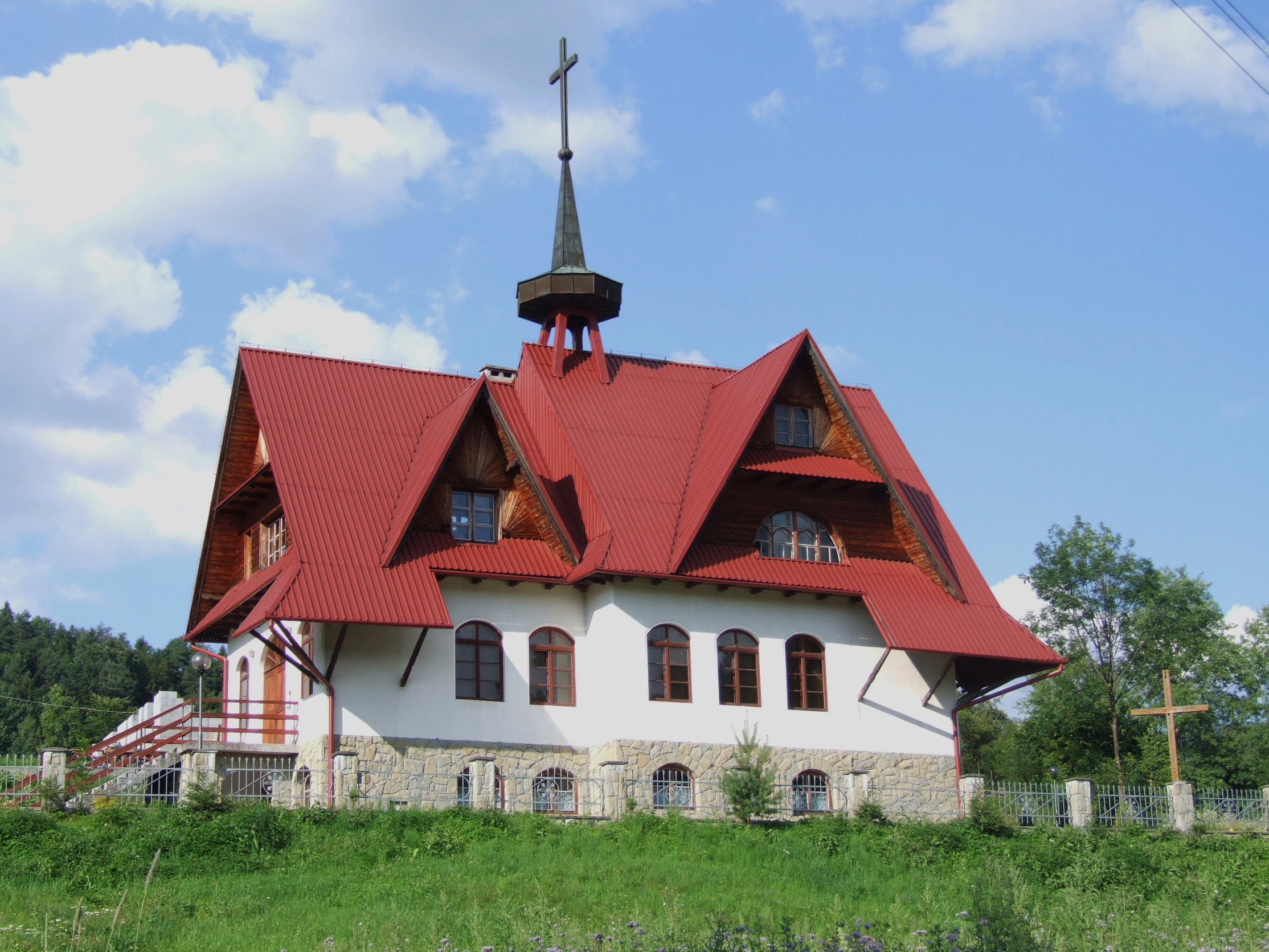 Kościół parafialny w Łostówce